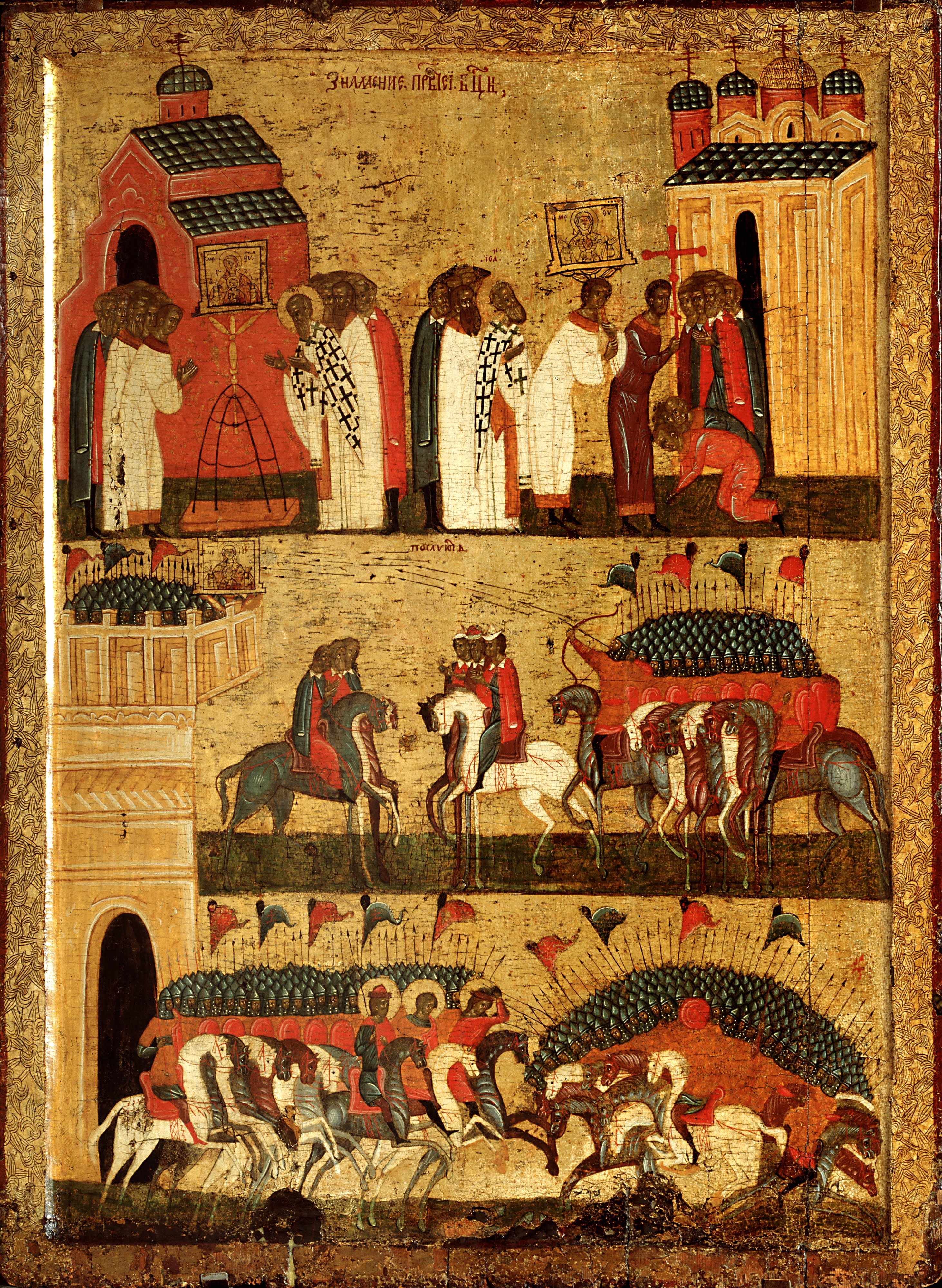 В основе сюжета иконы лежит действительное историческое событие. В 1169 году войска суздальского князя Мстислава Андреевича, сына Андрея Боголюбского, осадили Новгород, но не смогли взять его, благодаря чуду от новгородской святыни – иконы «Богоматерь Знамение». На иконе последовательно раскрывается это событие. В верхнем регистре – новгородцы молятся перед иконой «Богоматерь Знамение» у церкви Спаса на торговой стороне, затем переносят ее в детинец к собору Святой Софии. В среднем регистре – послы ведут переговоры и одновременно начинаются военные действия, суздальцы мечут стрелы в икону «Богоматерь Знамение». Икона, стоящая на башне, заслоняет собой новгородцев и ослепляет врагов. В нижнем регистре изображено выступающее из крепостных ворот новгородское войско, которое возглавляют святые воины Георгий, Борис и Глеб. Справа – разбитое смятенное войско суздальцев. «Знамение от иконы Богородицы (Битва новгородцев с суздальцами)» – яркий, характерный пример новгородской иконописи эпохи расцвета. В ней воплощена мощная духовная энергия; композиция отличается ясностью, выверенностью и четкостью построения; цветовая гамма с преобладанием киновари глубоко самобытна.